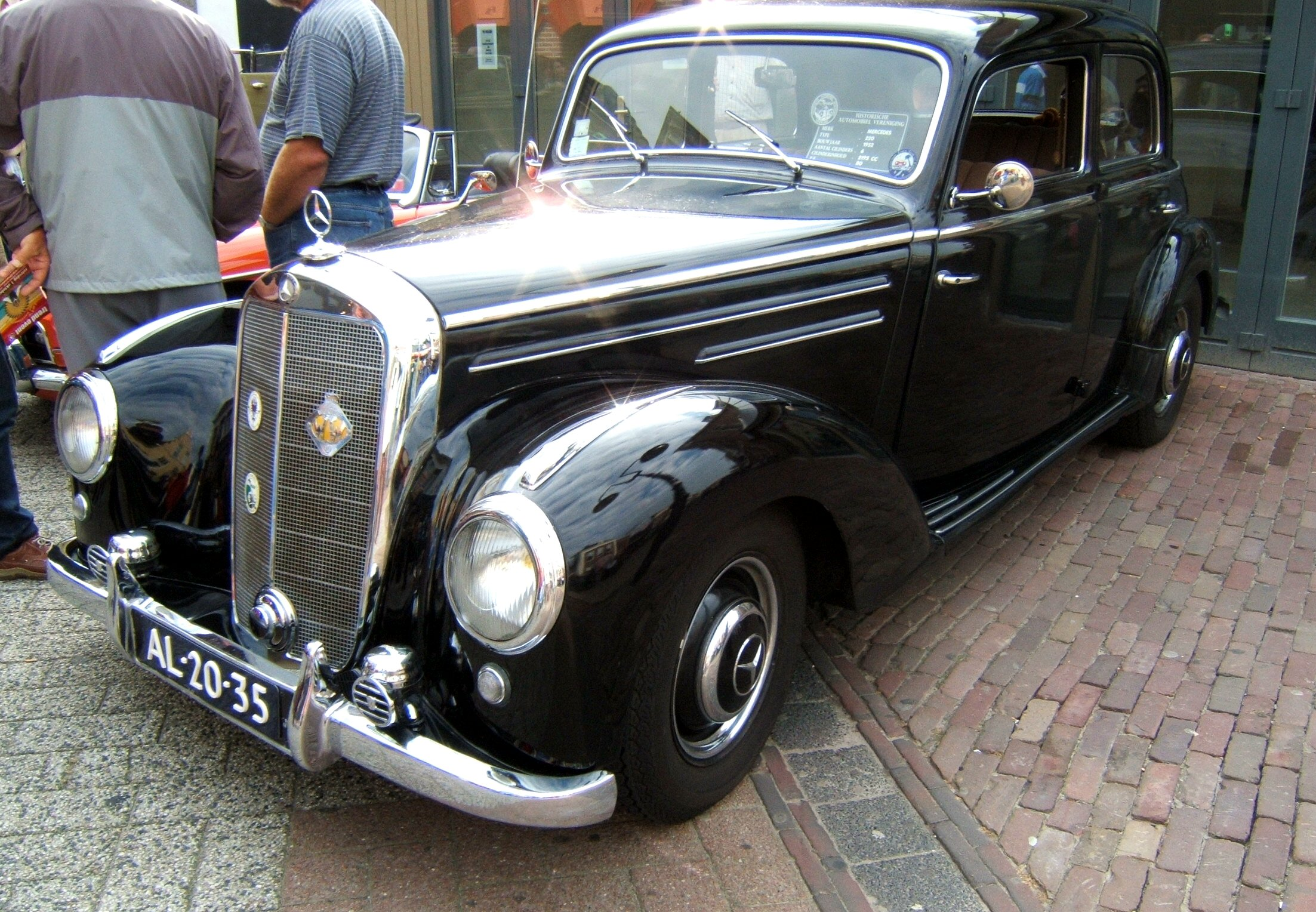 Categorie:Afbeelding auto